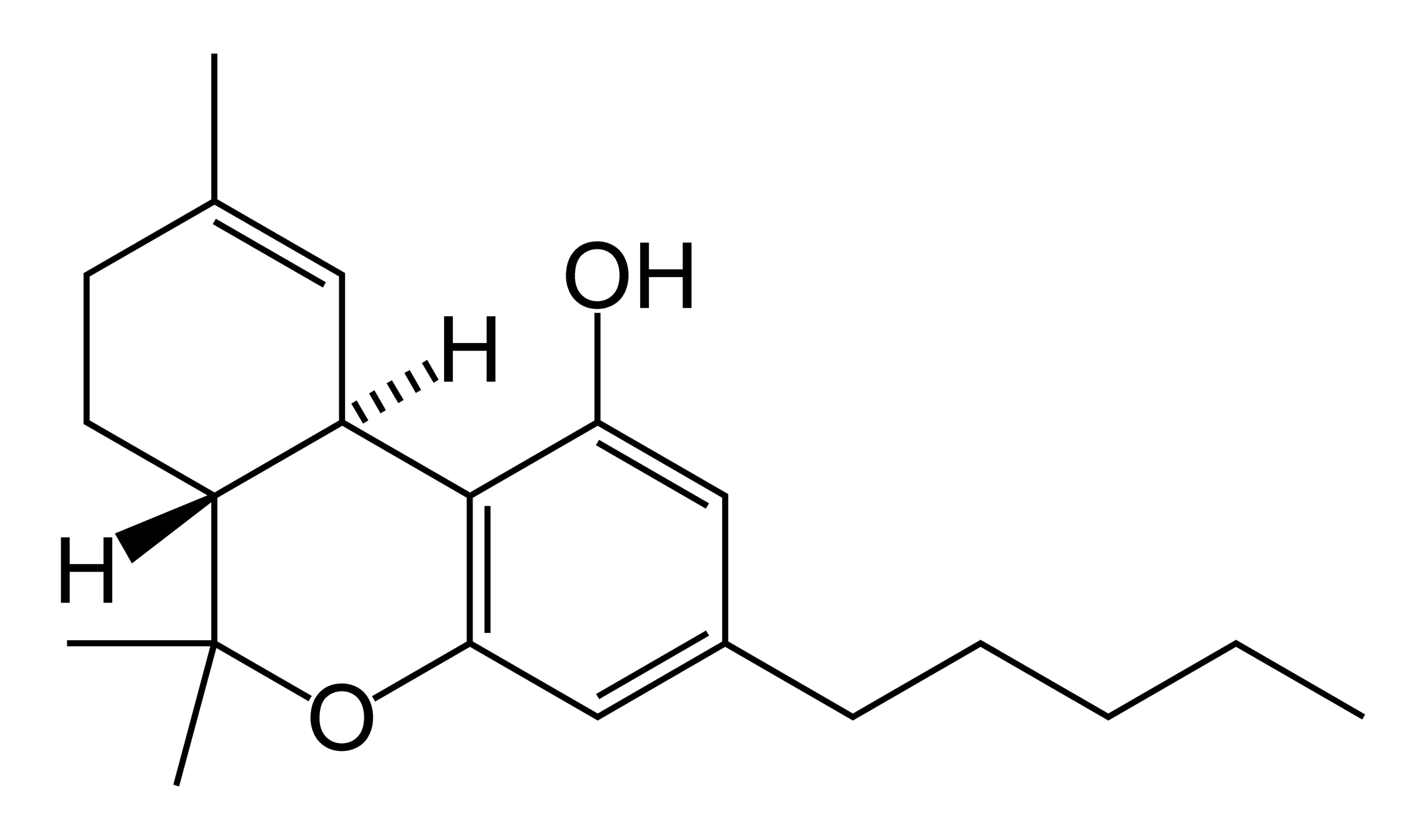 THC-skeletal